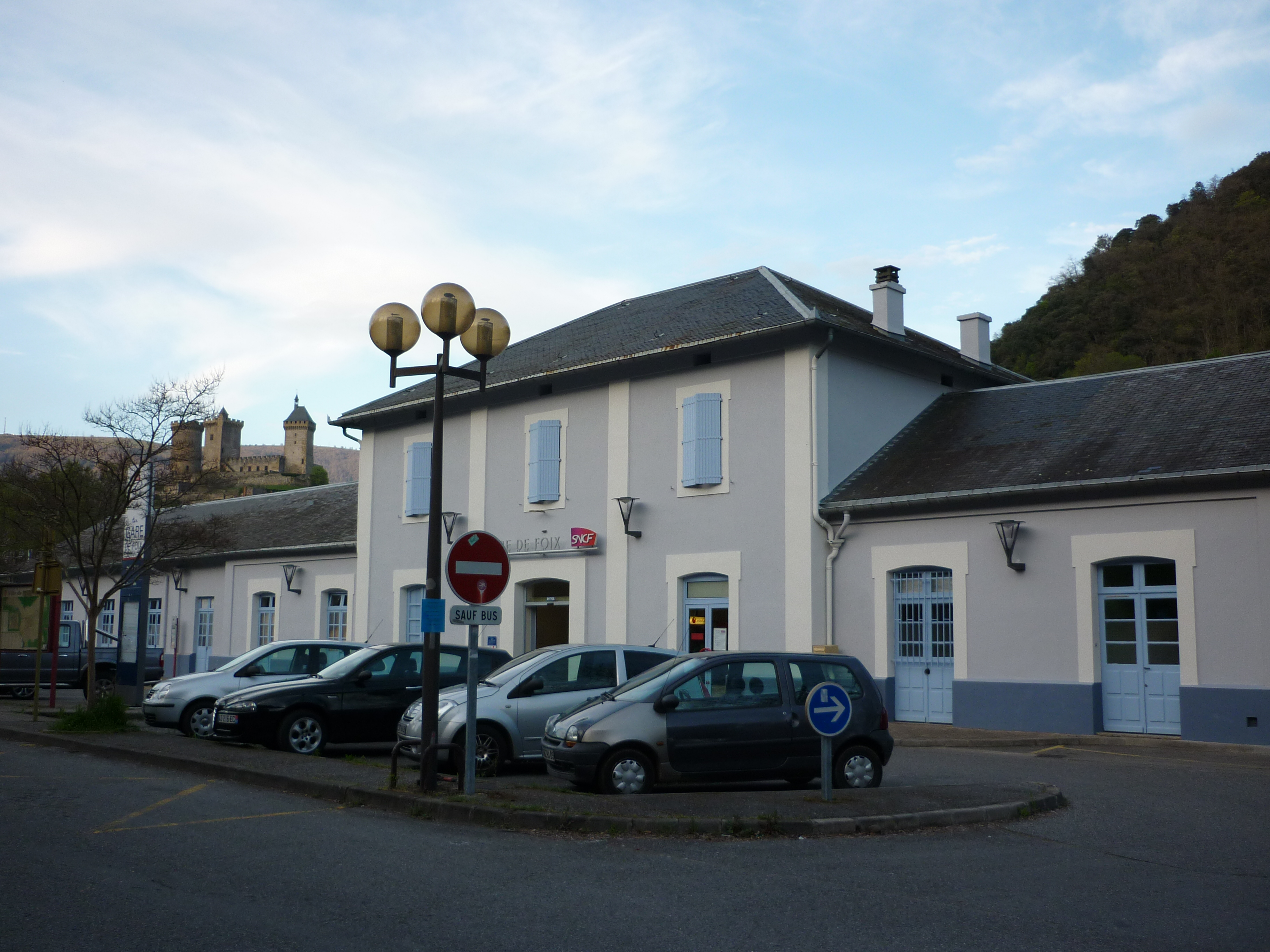 Vue de la gare SNCF de Foix (Ariège, Pyrénées)